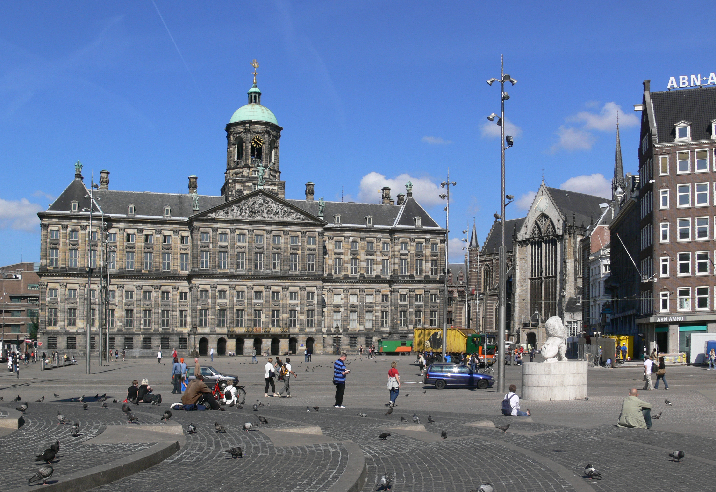 Koninklijke Paleis en Nieuwe Kerk, Dam, Amsterdam